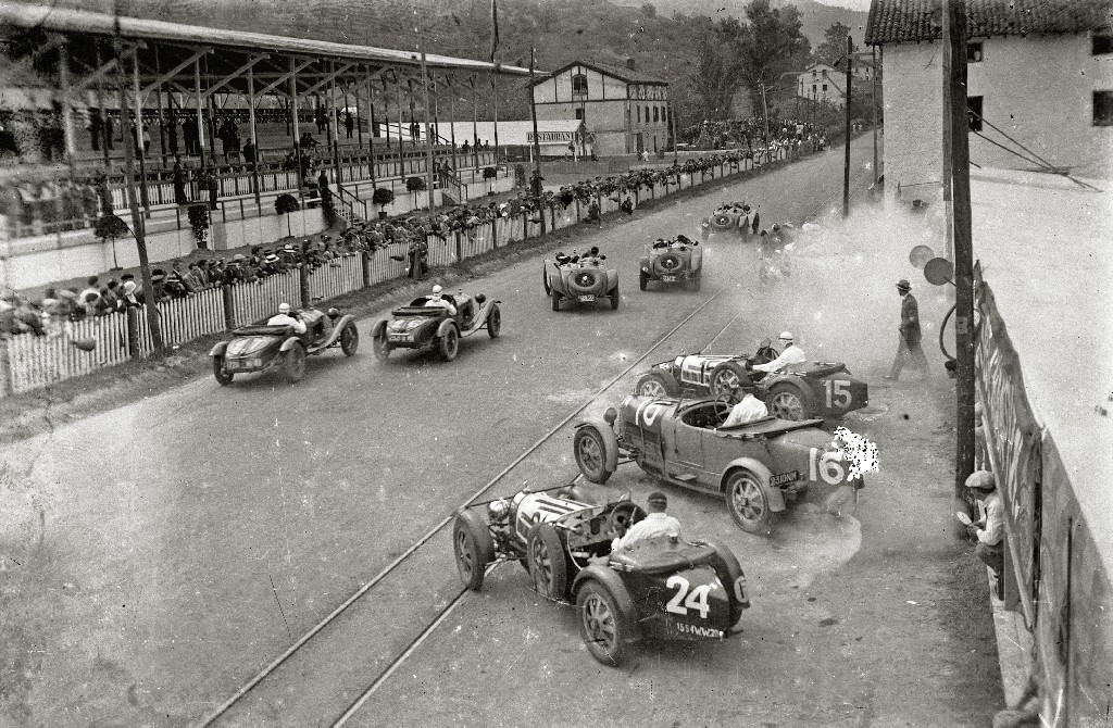 Título original: VII Gran Premio de España de Vehículos Sport celebrado en el circuito automóvilistico de Lasarte (3/9) Localización: Circuito de Lasarte (Guipúzcoa)